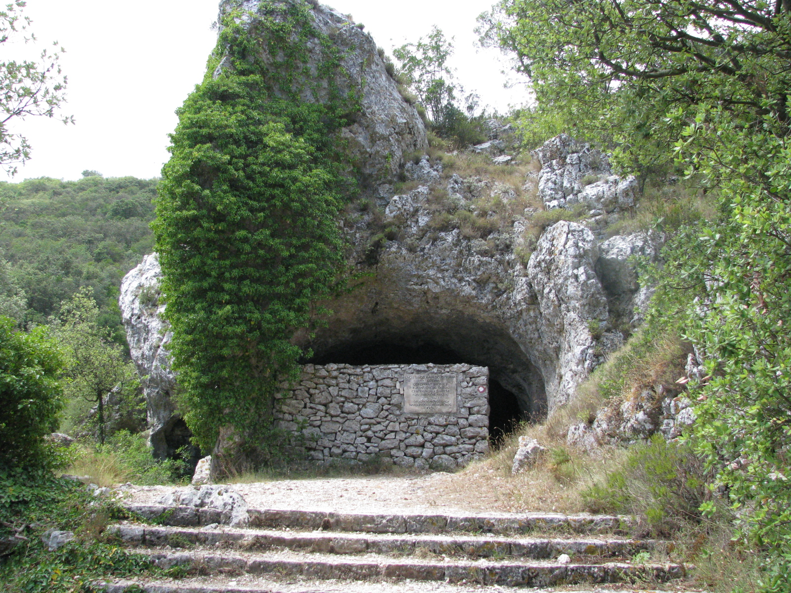 Titova špilja na Visu